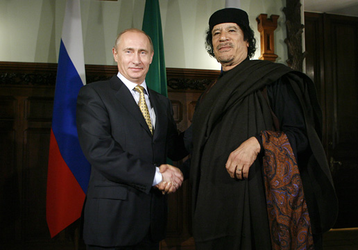 Председатель Правительства В.В.Путин провел встречу с лидером ливийской революции Муаммаром Каддафи